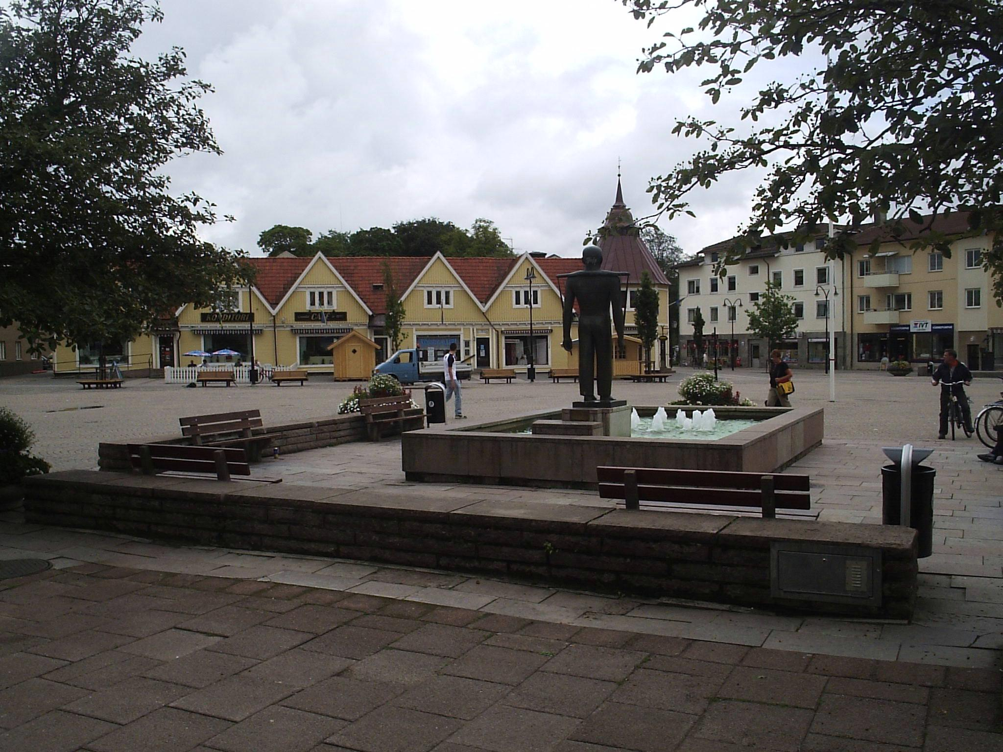 Gamla Torget med Basarlängan i Tidaholm